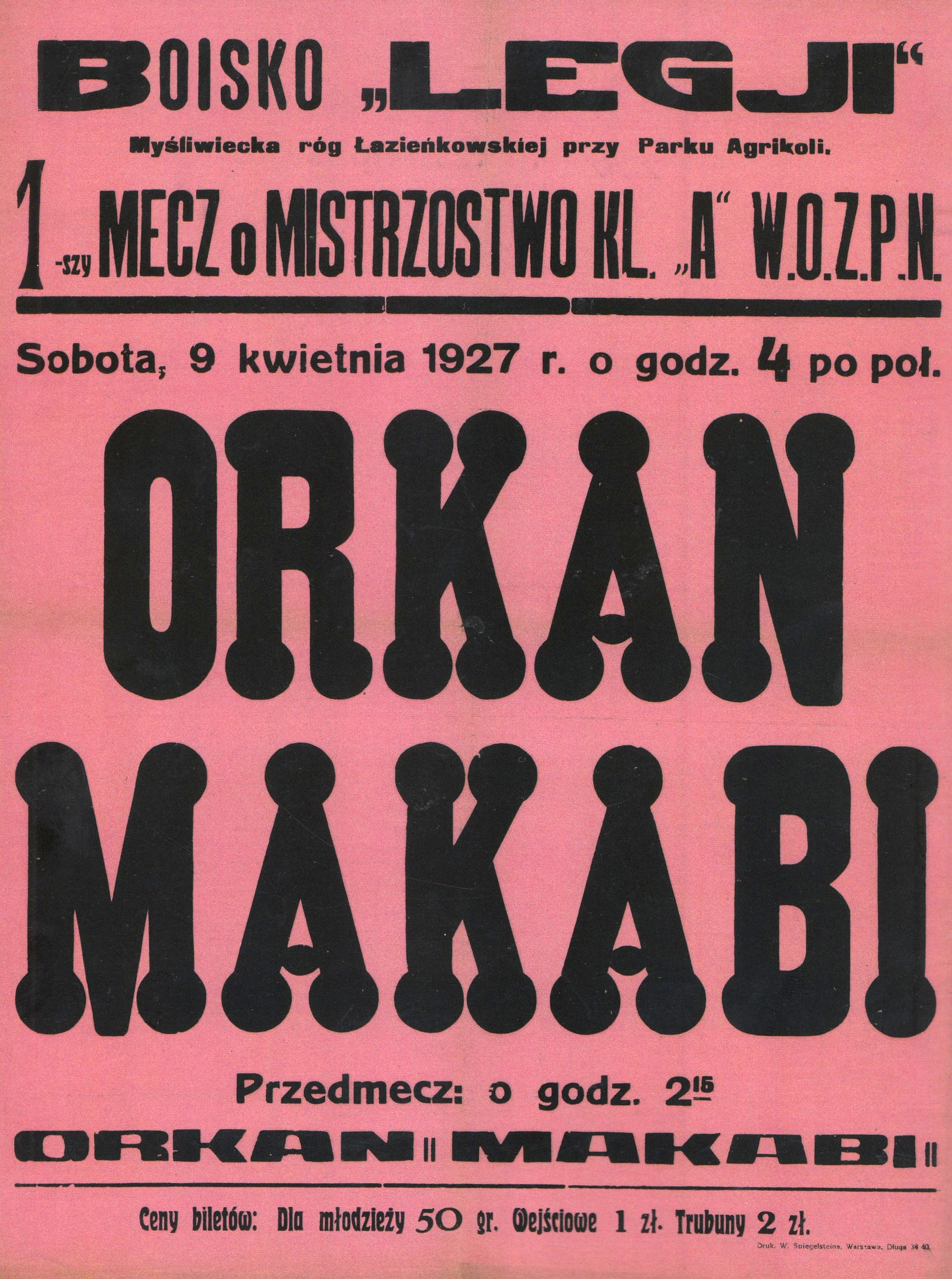 Plakat zapowiadający mecz piłki nożnej Orkana i Makabiego Warszawa na Stadionie Legii 9 kwietnia 1927